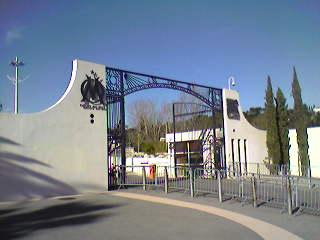 Entrée du Centre d'entrainement Robert Louis-Dreyfus